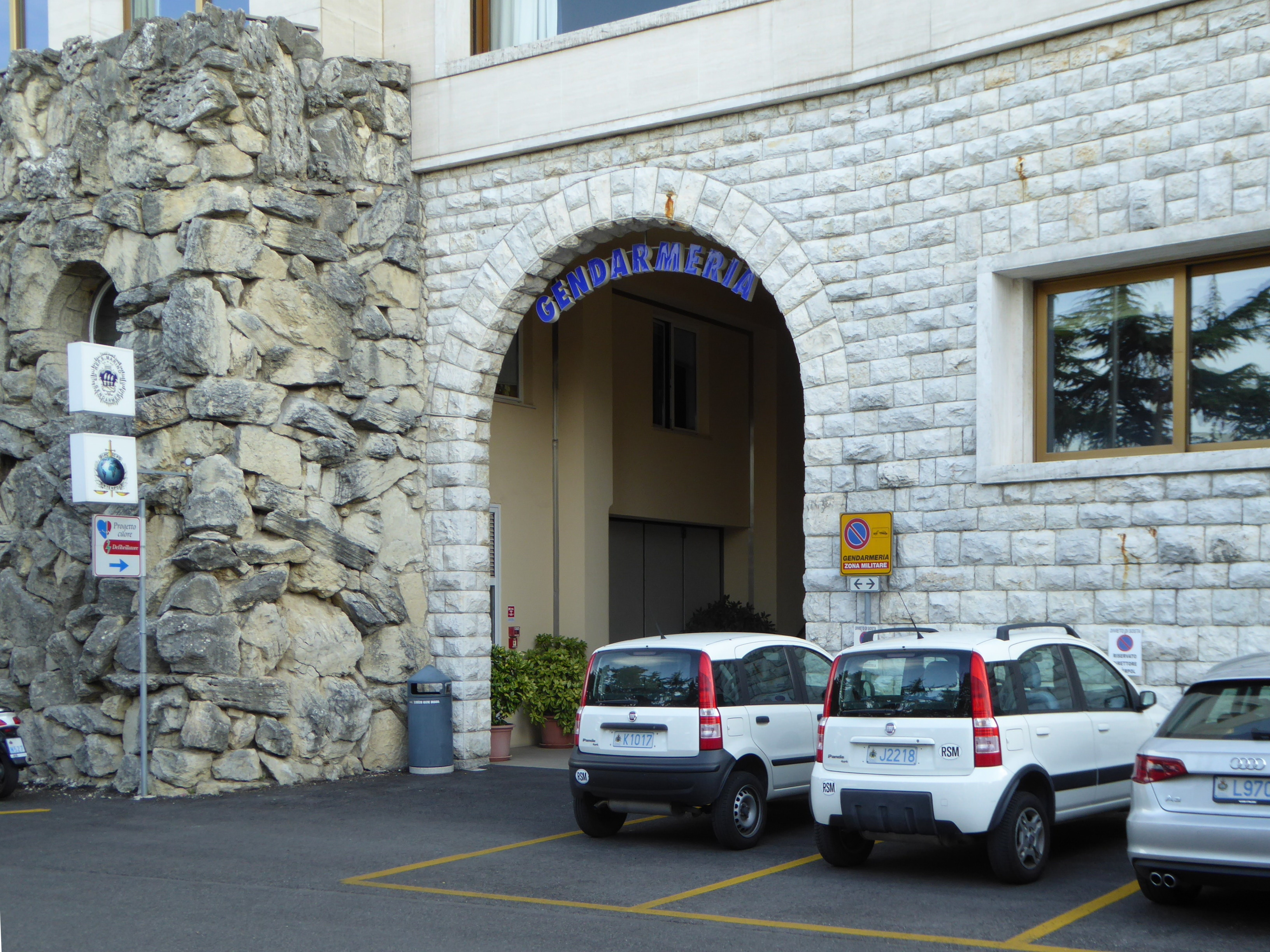 Die Zentrale der Gendarmerie von San Marino an der via John Fitzgerald Kennedy.